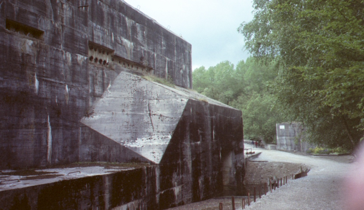 Photographie du Blockhaus d'Éperlecques